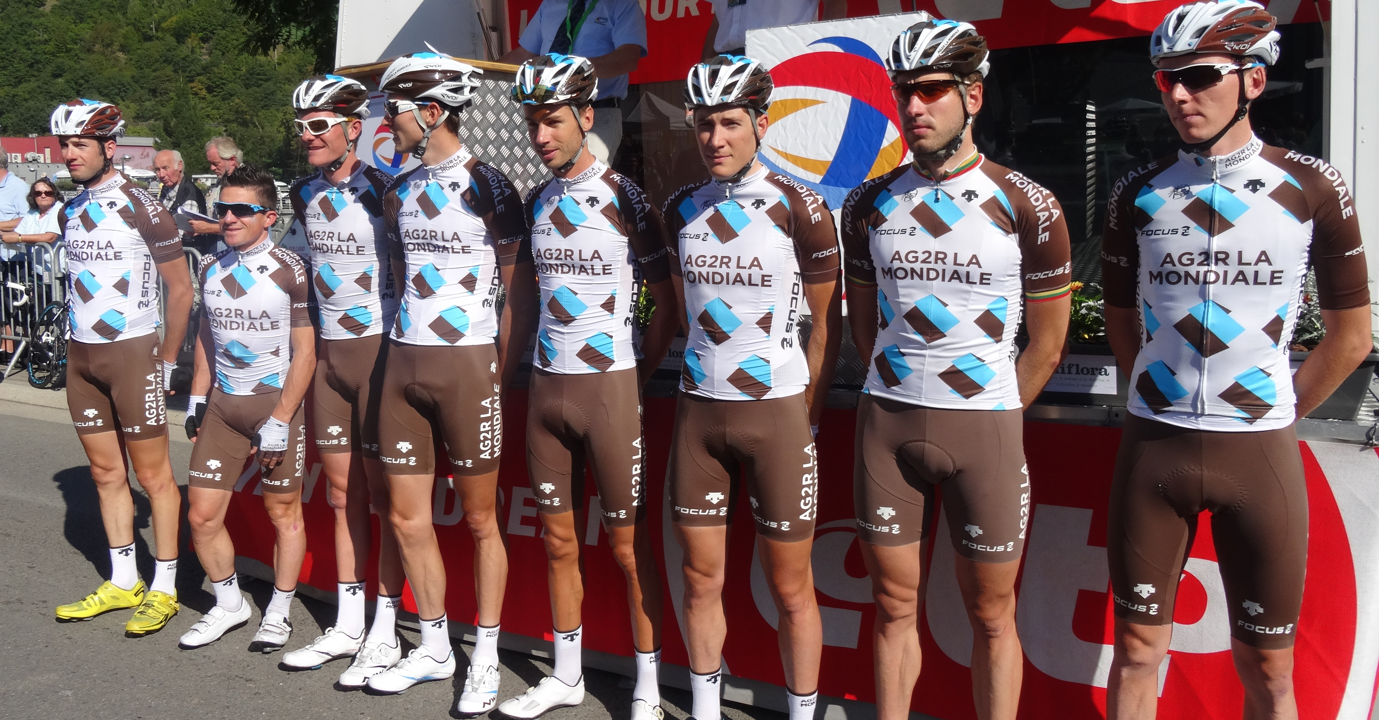 Reportage photographique réalisé le mercredi 17 septembre à l'occasion du départ du Grand Prix de Wallonie 2014 à Chaudfontaine, Belgique.